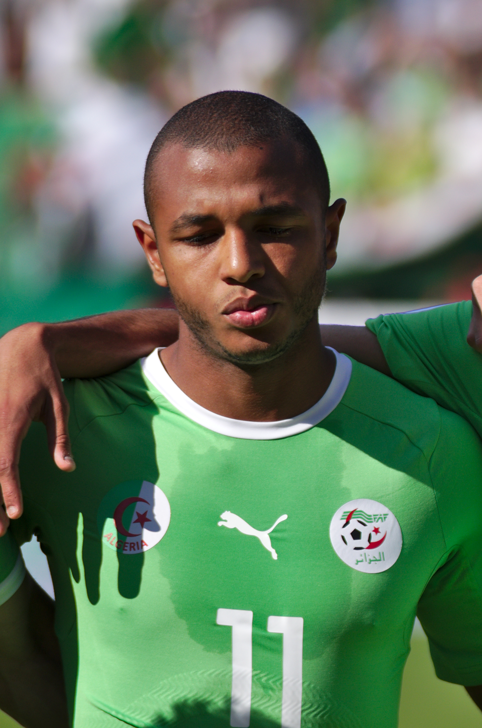 Algérie - Arménie - 20140531 - Yacine Brahimi